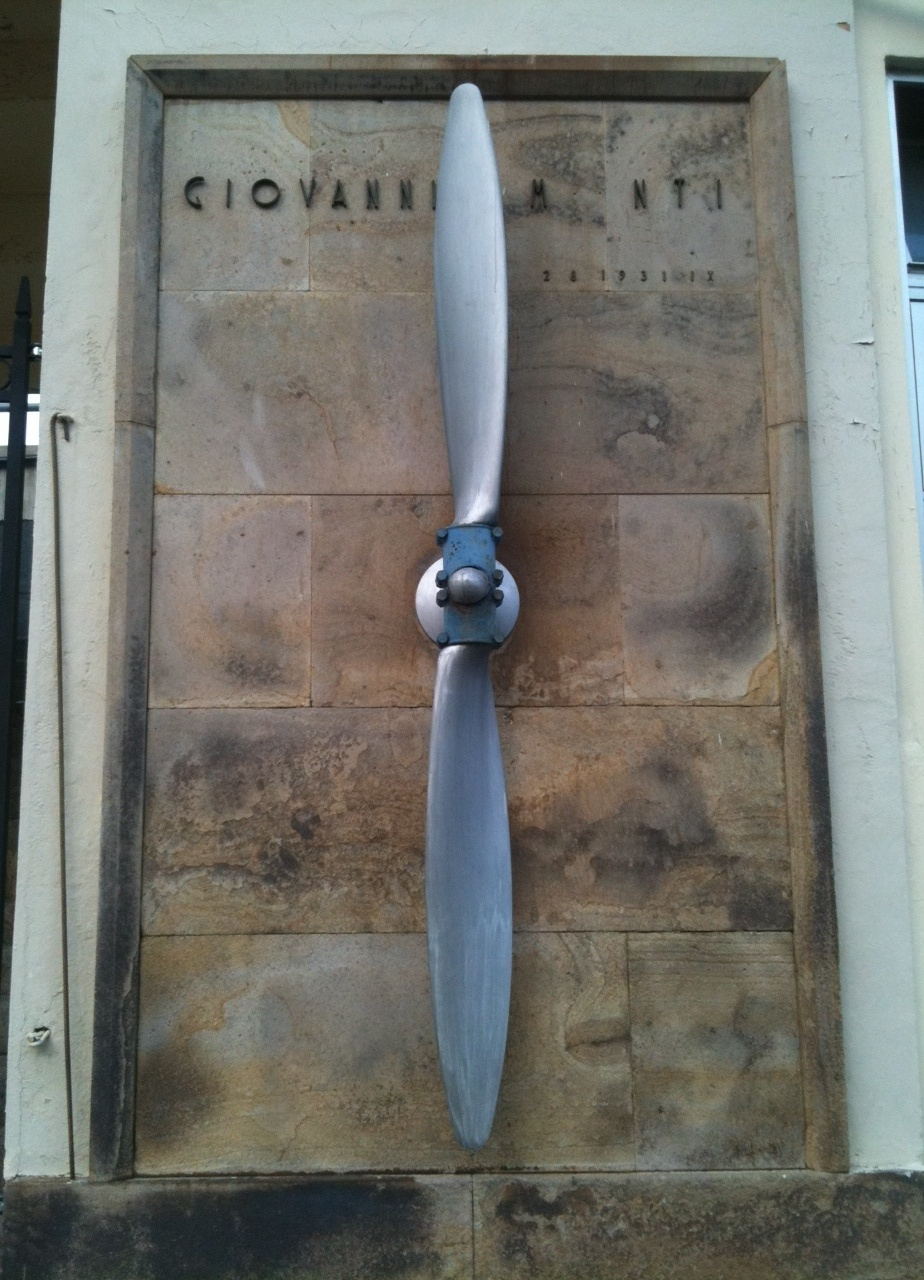 L'elica dell'aereo di Giovanni Monti posta all'ingresso del velodromo di Padova. Foto di Pakdooik